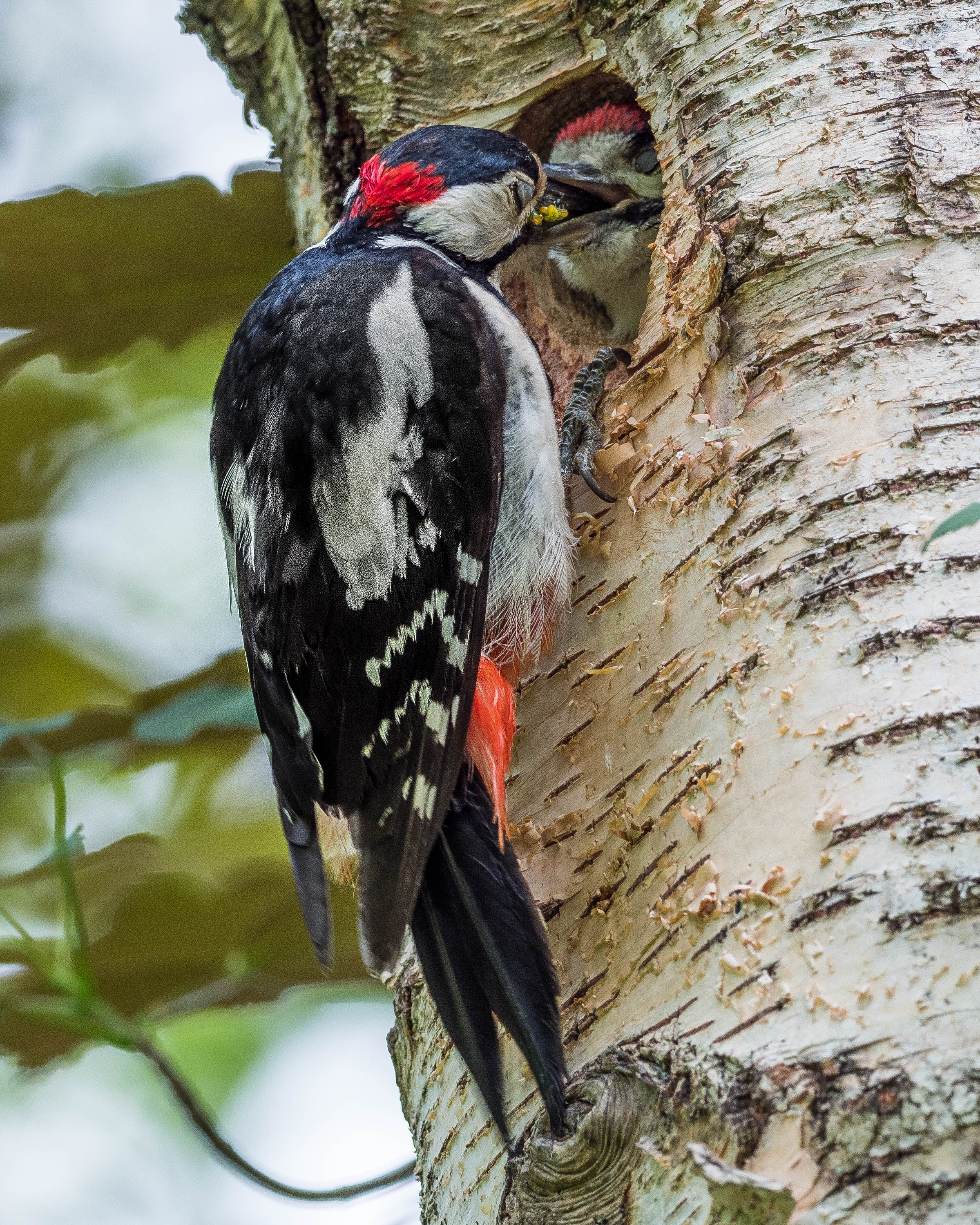 Dendrocopos major